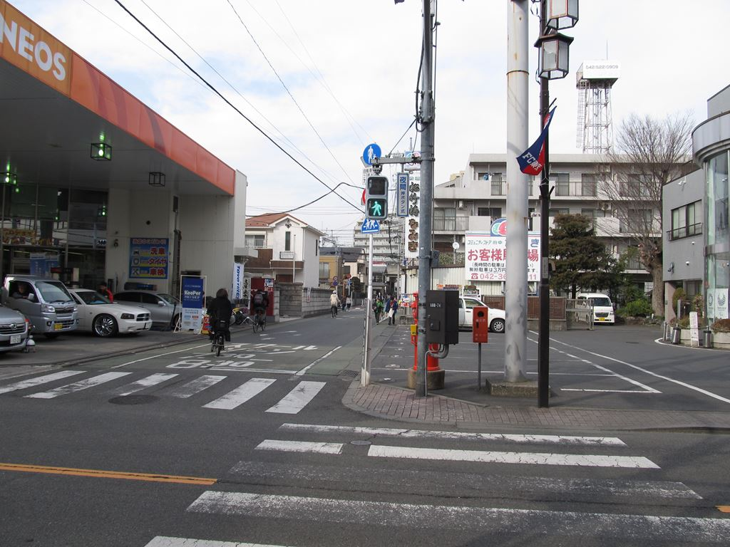 人見街道（八幡に接続）